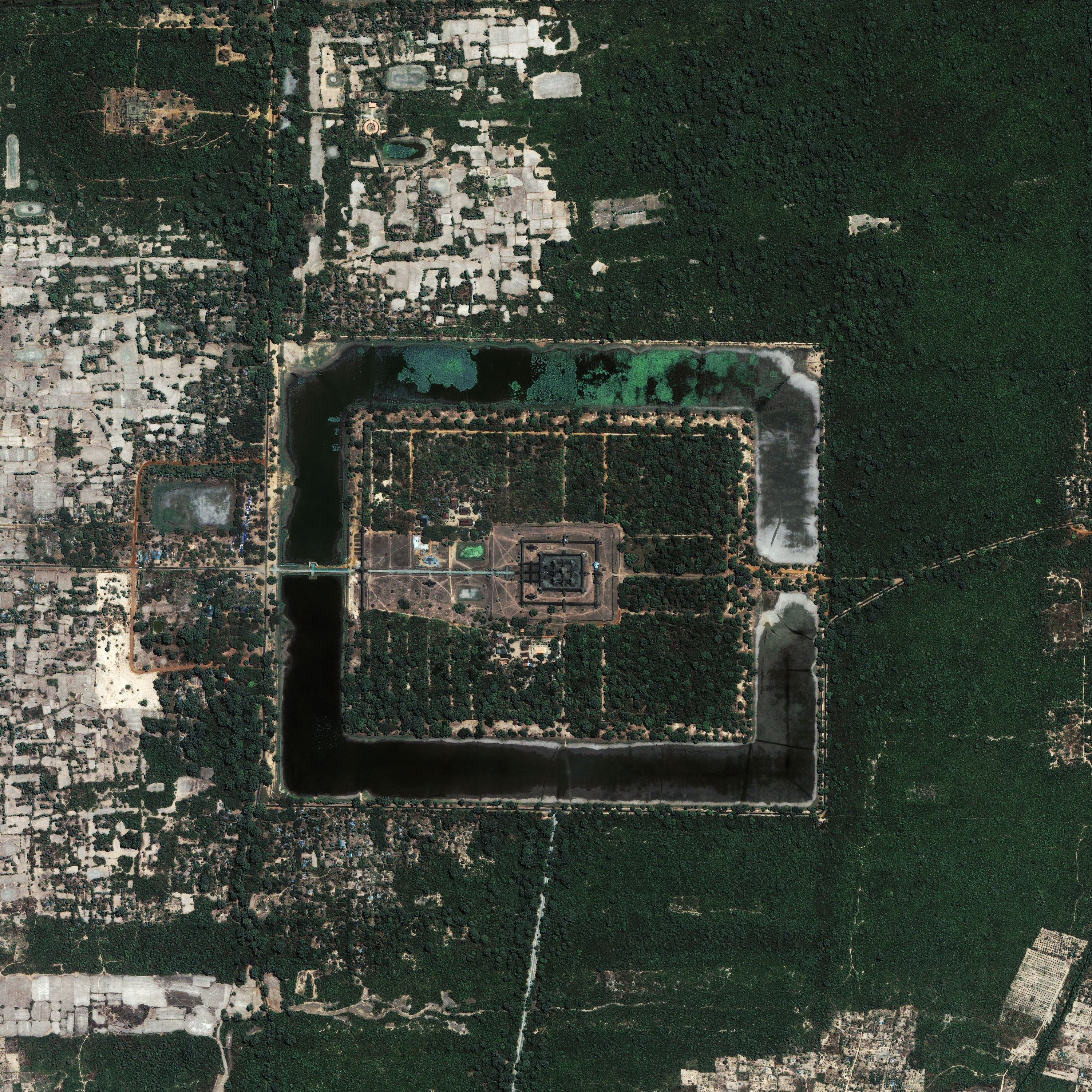 Angkor Wat